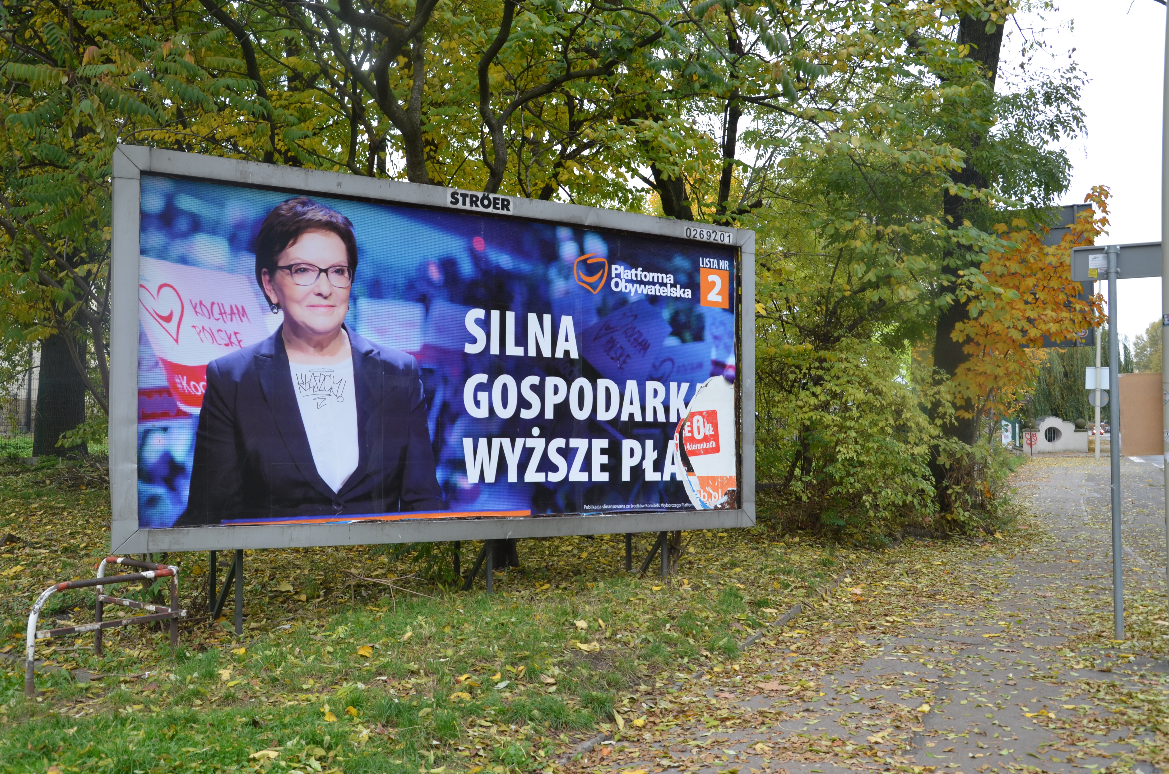 Wahlkampfplakate in Bielsko-Biała